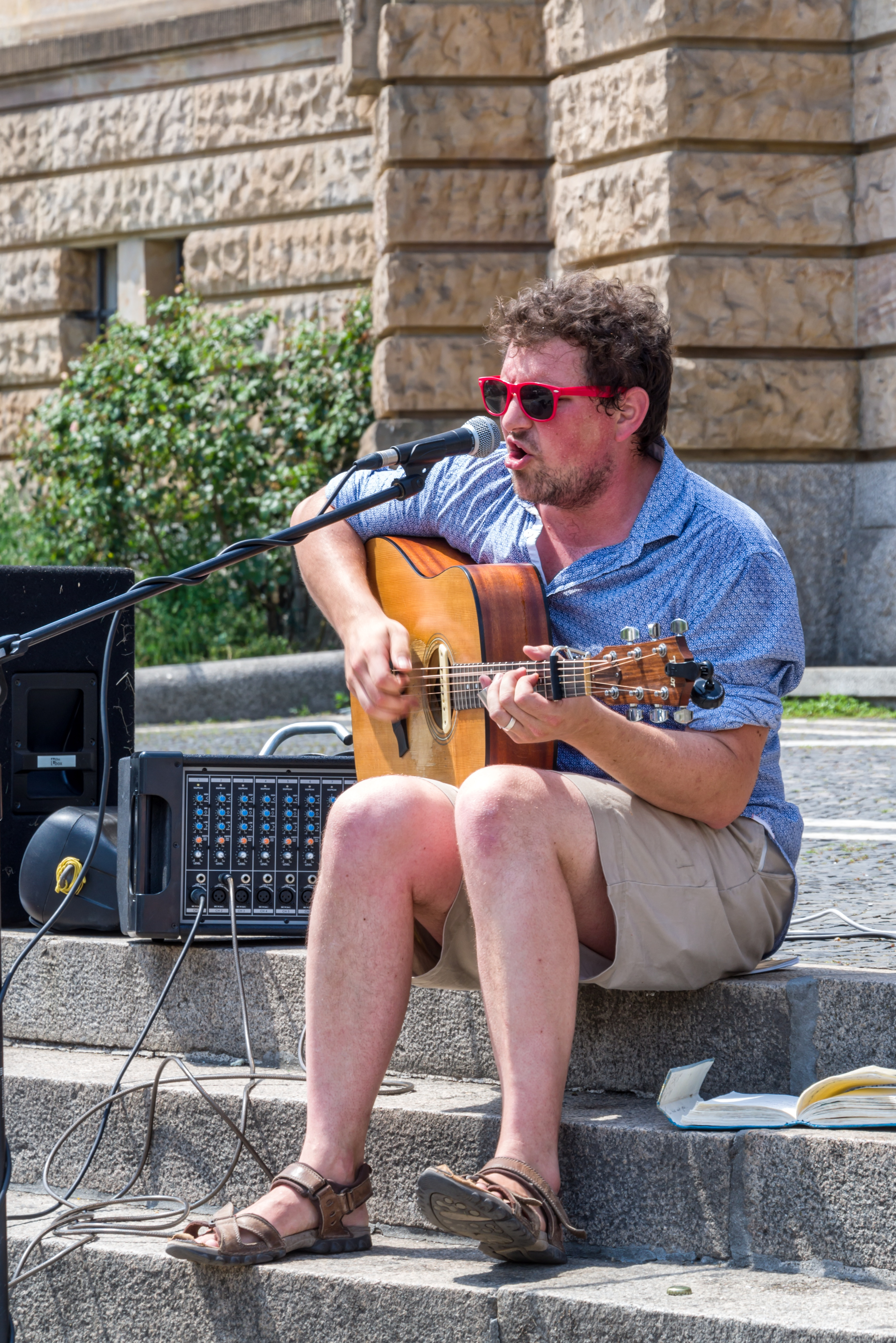 Bilder vom Zelt Musik Festival 2017 in Freiburg im Breisgau Musik in der Stadt